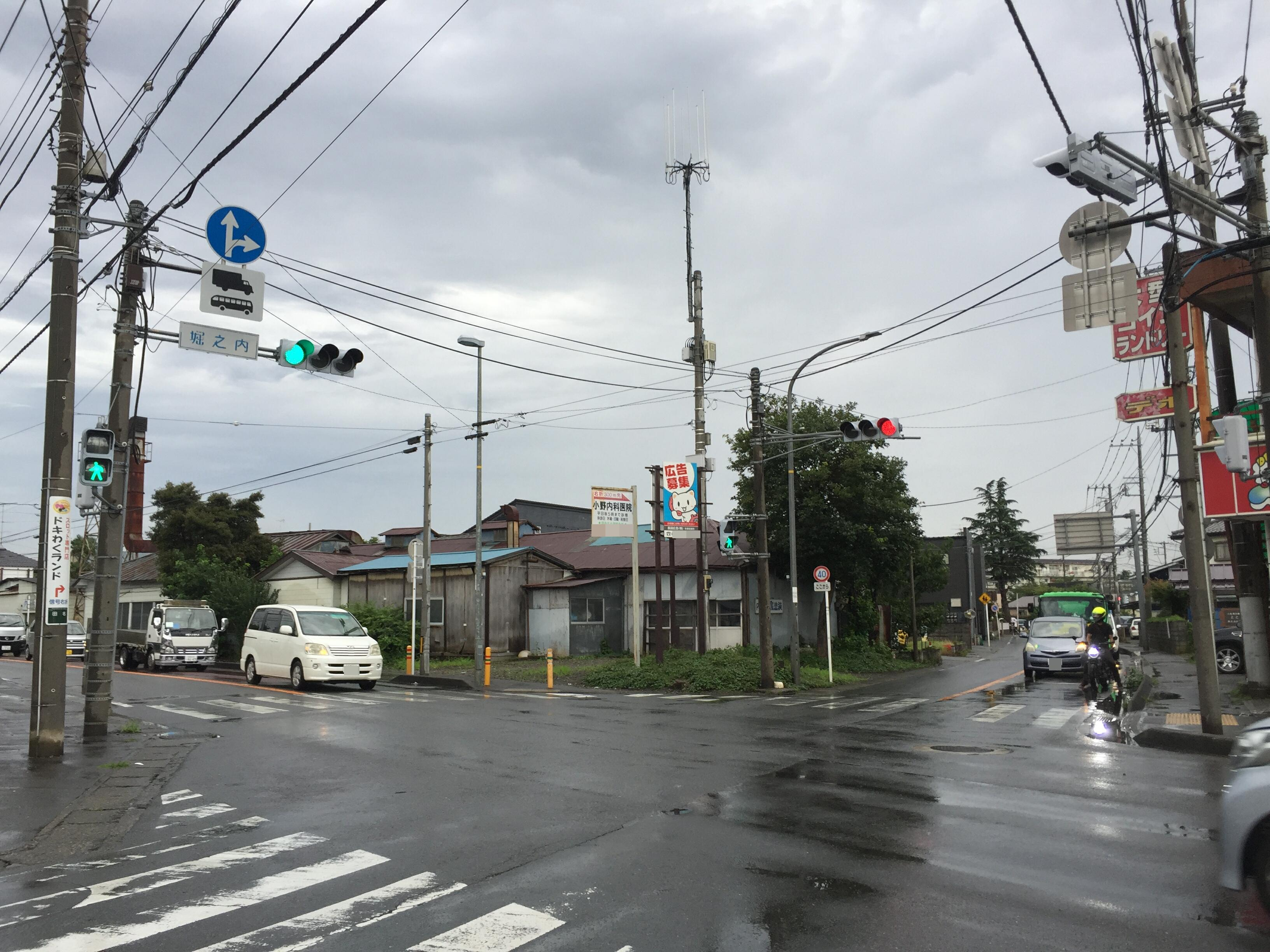 堀之内交差点（相模原市中央区田名）。県道48号・63号線交点。左は県道48号線・城山方面、正面は県道63号線・橋本方面。